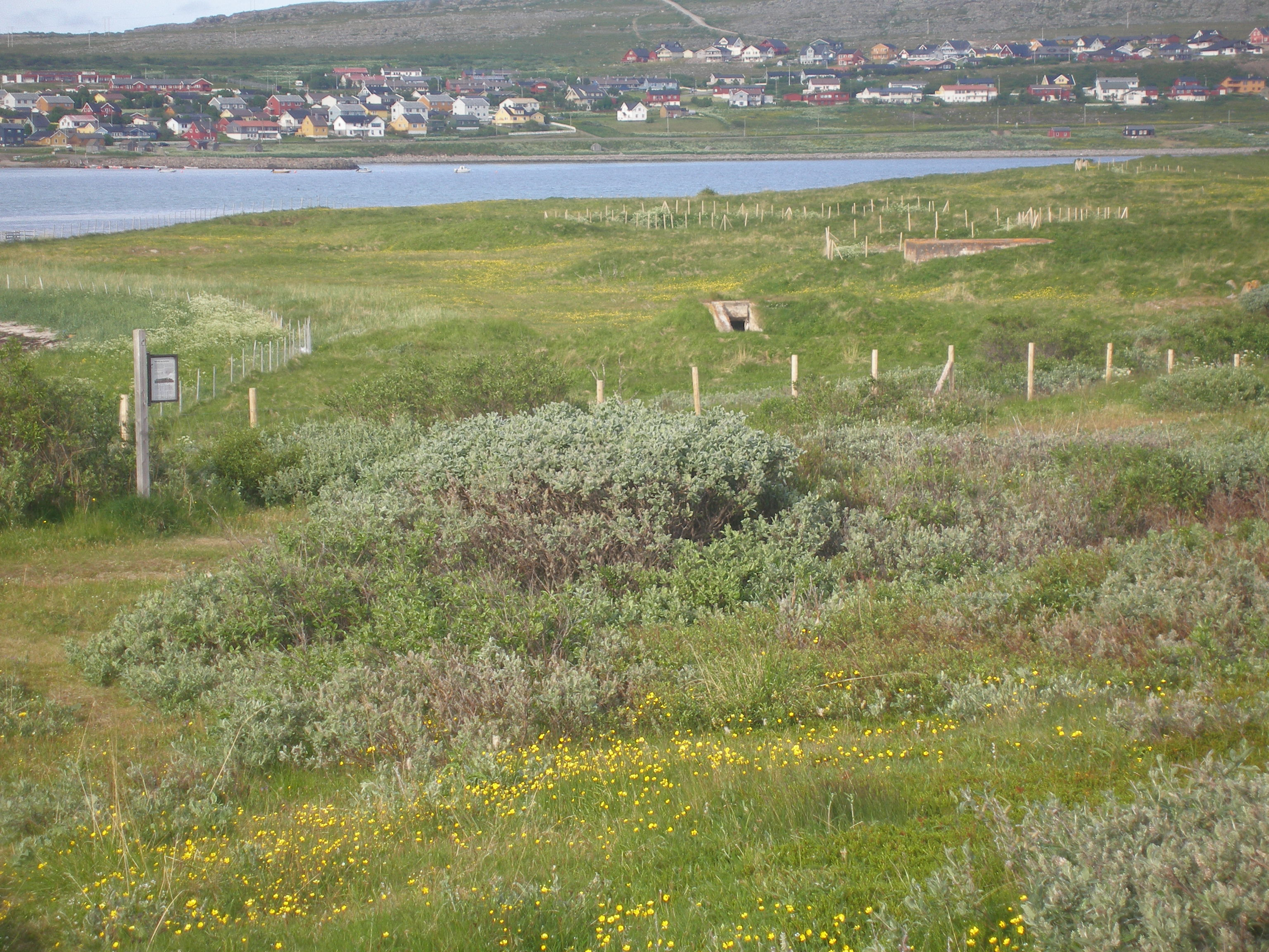 Die Insel vor Vadsø, Norwegen wurde von den deutschen Besatzern im 2. Weltkrieg zur 'Festung Vadsø' ausgebaut. Die Reste sind noch heute (wie auf diesem Foto) erhalten.